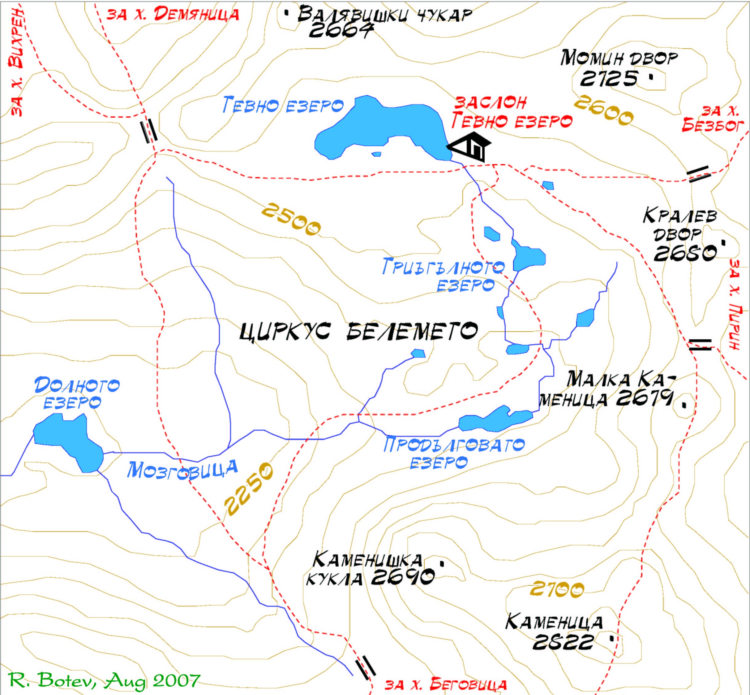 Malokamenishki lakes in Pirin, Bulgaria (map)